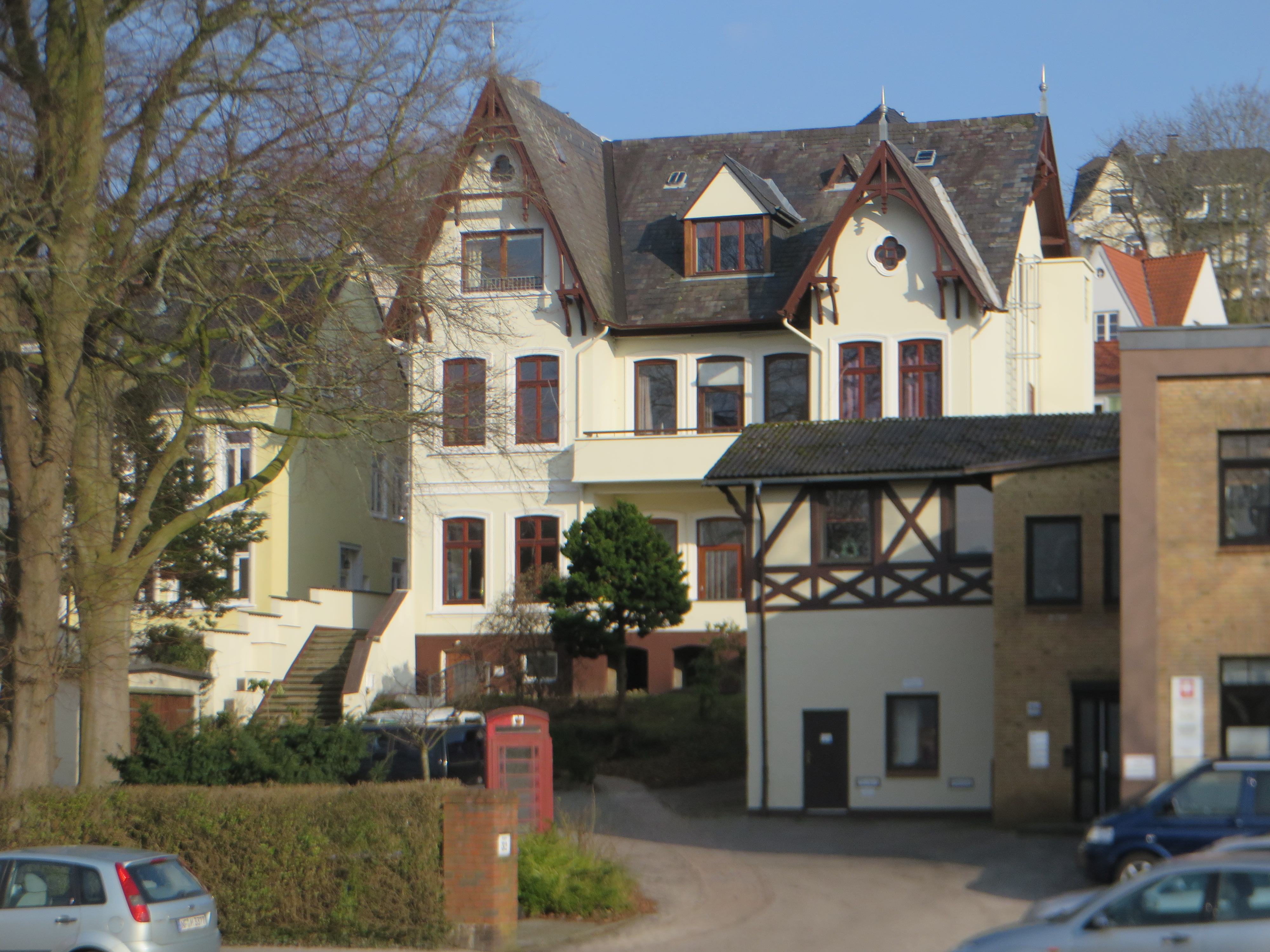 Dienstwohngebäude des Divisionskommandos (Flensburg-Jürgensby 2018), Bild 01